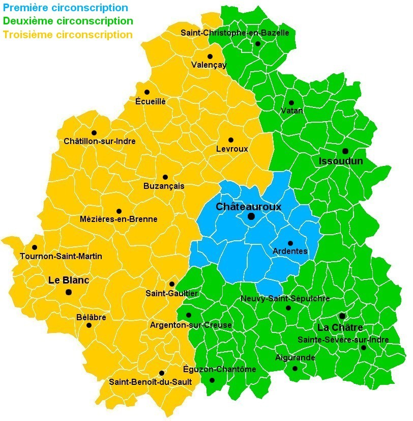 Carte des communes de l'Indre (36) : La carte des circonscriptions de l'Indre de 1988 à 2012.